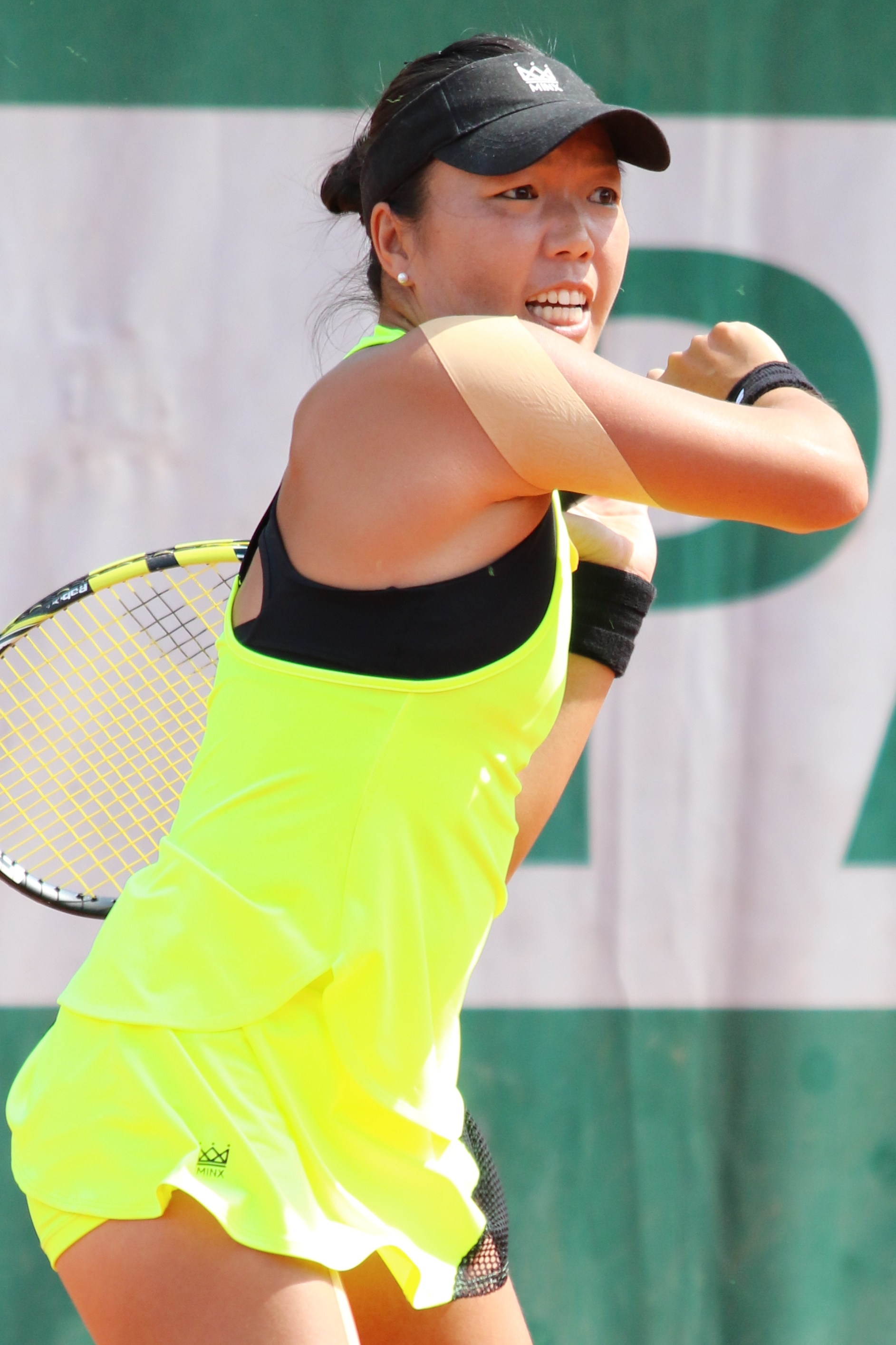 King RG18 (28)